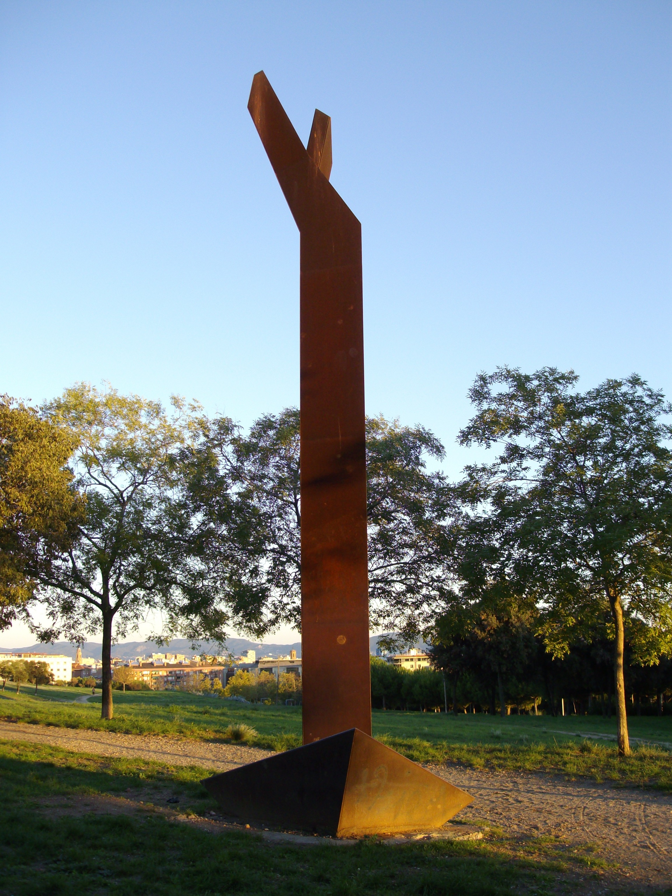 Arbre de ferro (Árbol de hierro), obra realizada en 1986 por el escultor sabadellense Antoni Marquès, tiene 8,30 metros de altura y está situada en el "camí de la ciutat" (camino de la ciudad) dentro del Parque de Cataluña, en Sabadell, Barcelona (España). Esta obra conmemora una plantación popular de árboles naturales que supuso el inicio del proyecto del parque.